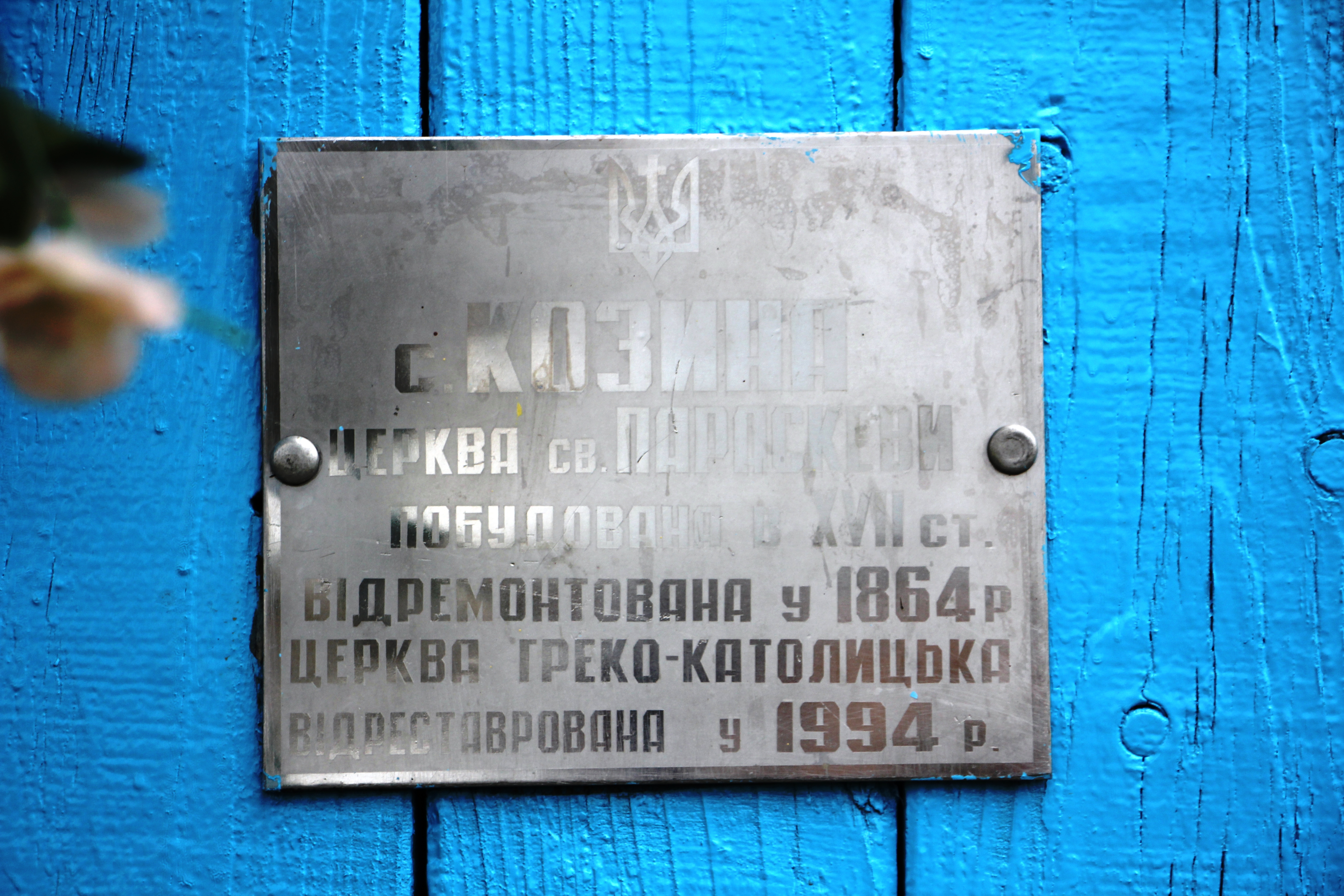 Церква св. Параскеви XVIIст